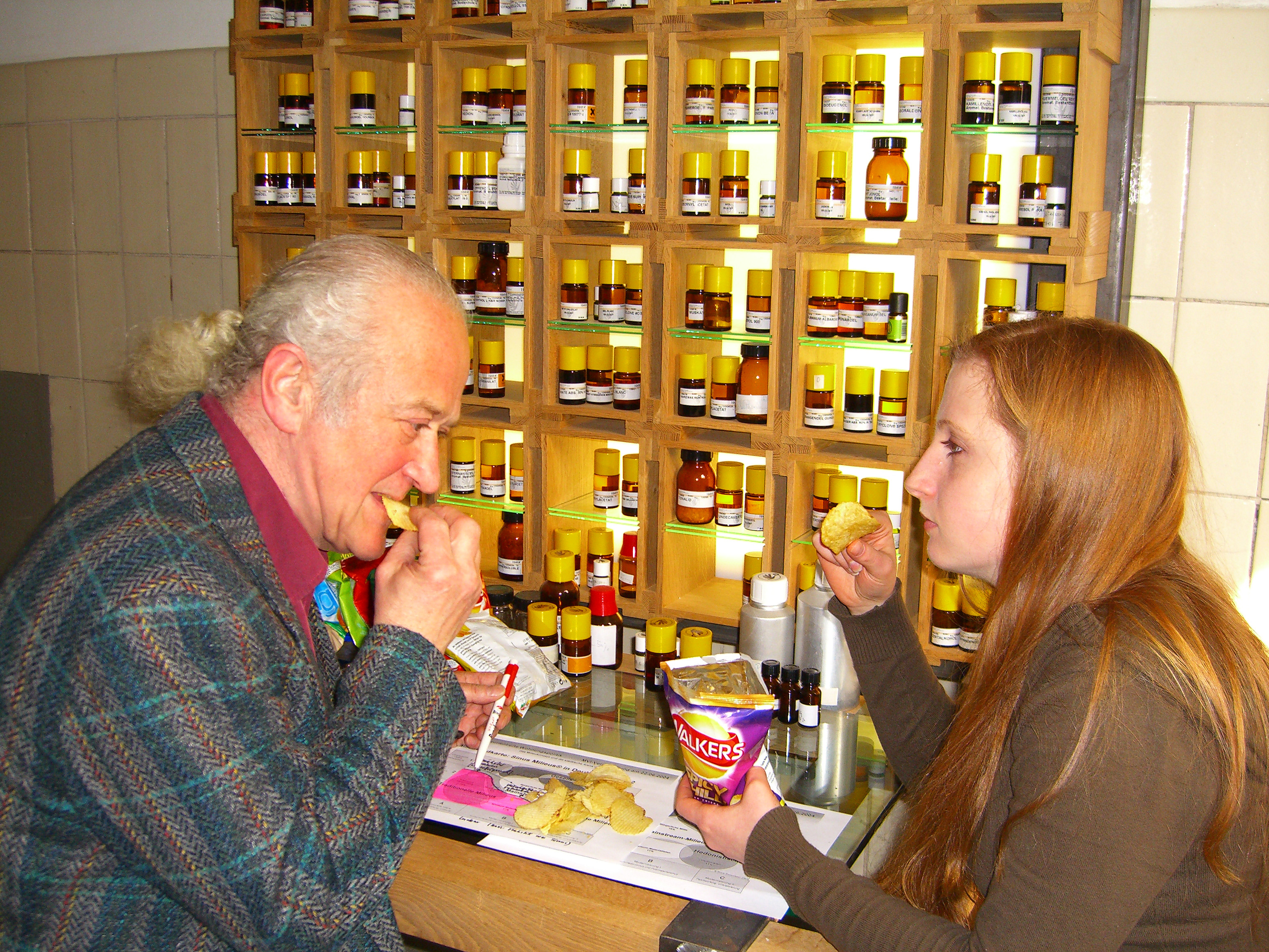 Multisensuelles Design für Walkers Global, 2007